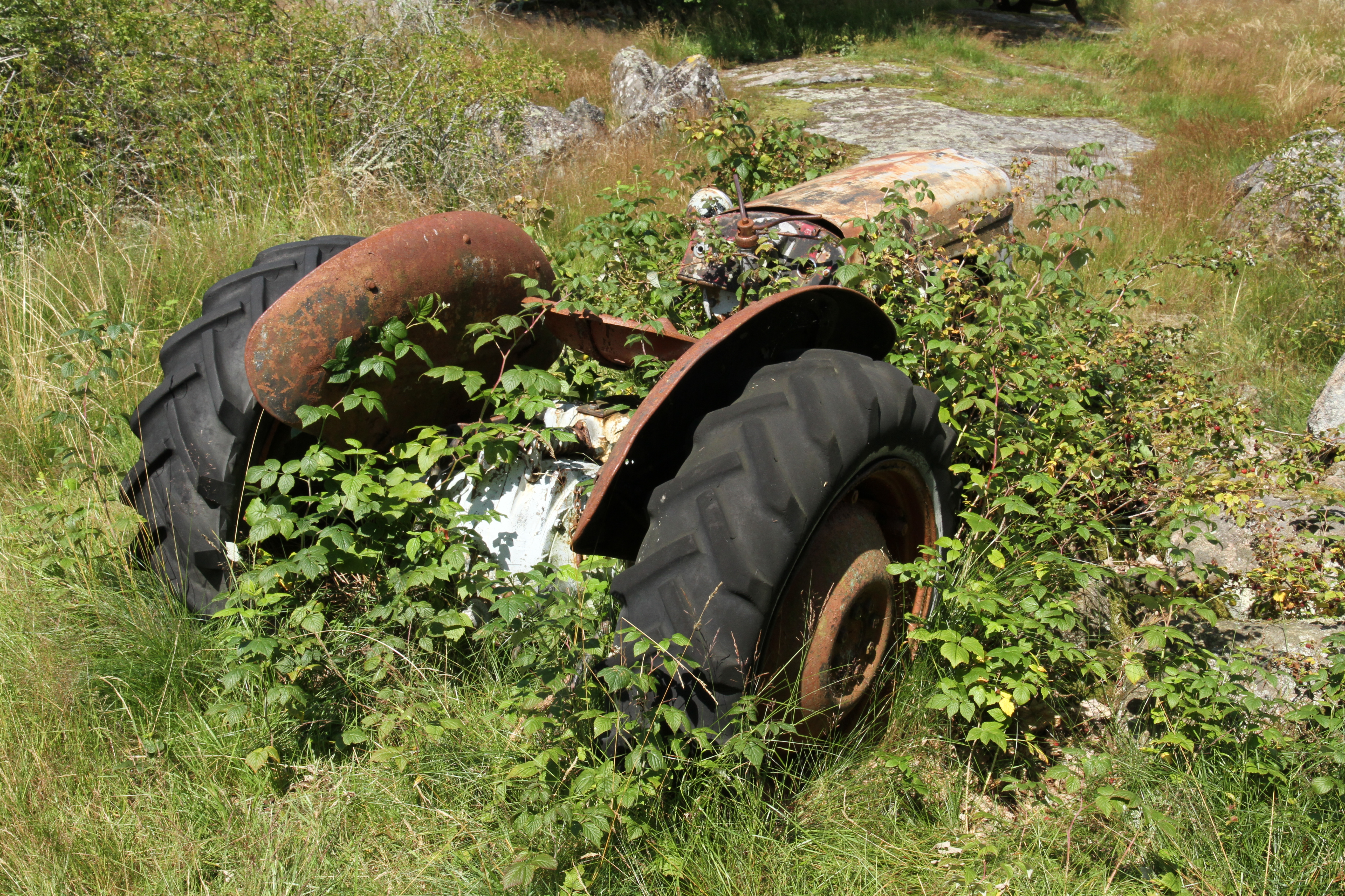 Tjärö, Karlshamn, Blekinge 25 juli 2011